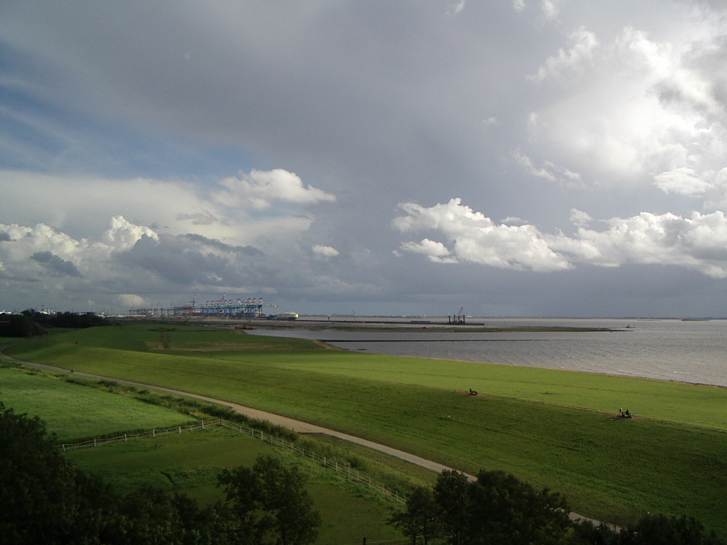 Imsum, Stadt Langen. Blick vom "Ochsenturm" auf die Hafenanlagen von Weddewarden (Bremerhaven) Foto von Benutzer:Geoz 2005